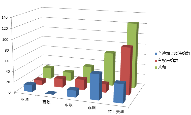 本图显示了1824年-2004年全球发生的主权违约数量。数据来源：The Costs of Sovereign Default; Eduardo Borensztein and Ugo Panizza; IMF Working Paper 08/238; October 1, 2008 根据文中figure 1重新绘制。